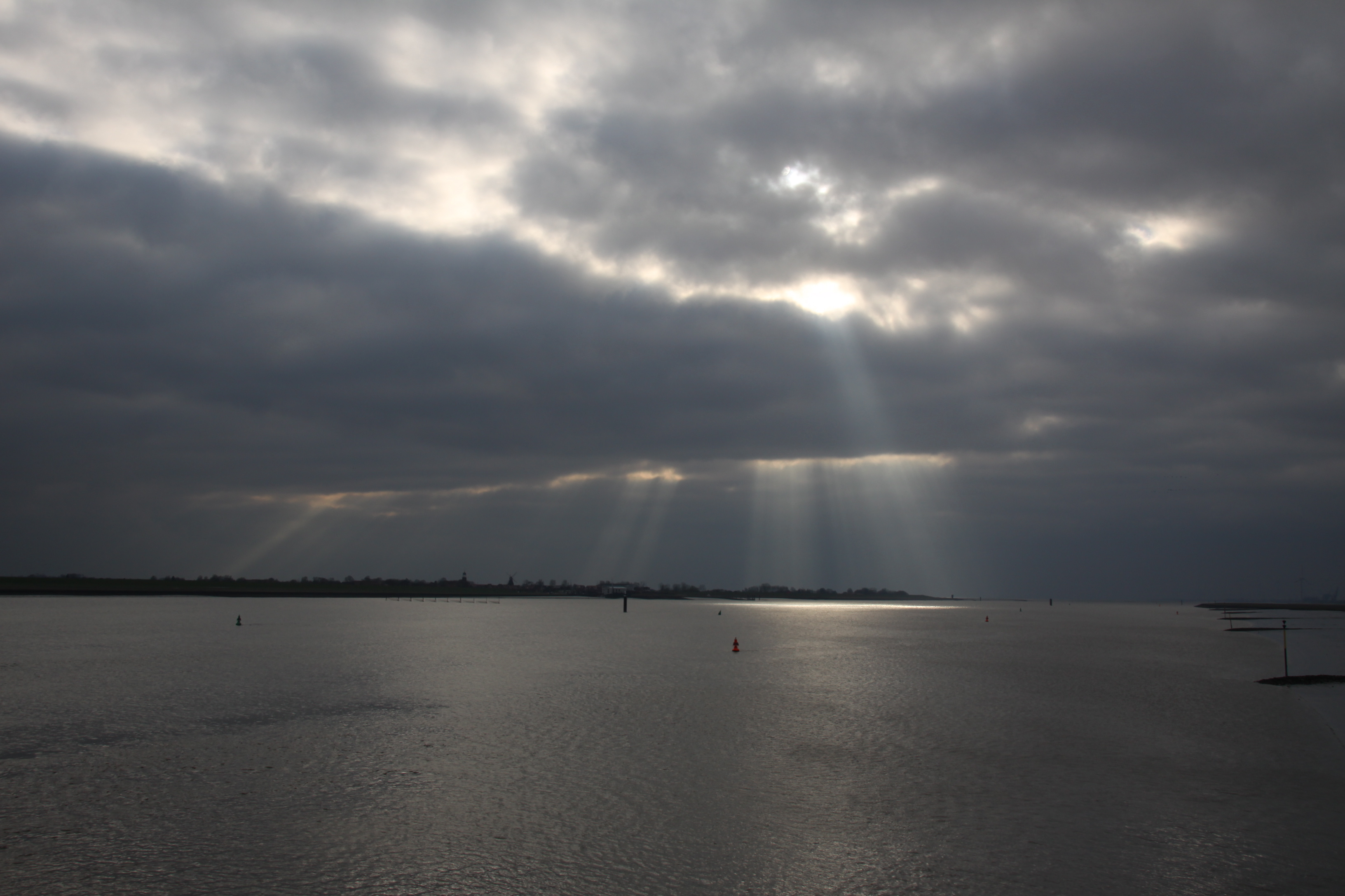 Sonne und Wolken bei Ditzum an der Ems